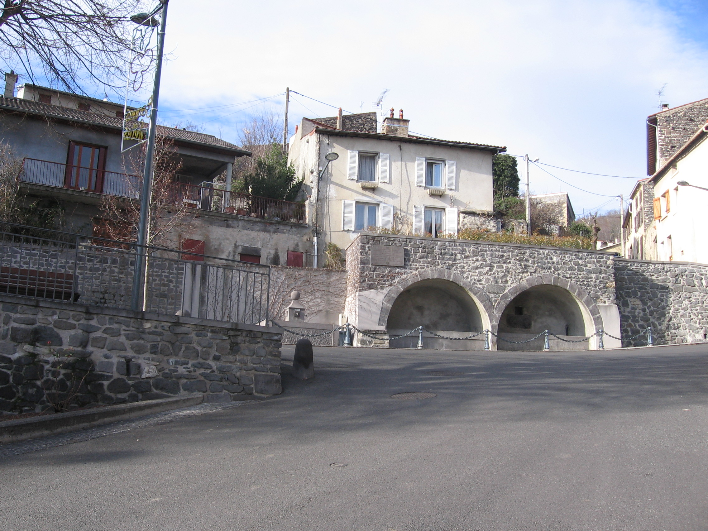 Place de Grergovie (Auvergne) en hiver